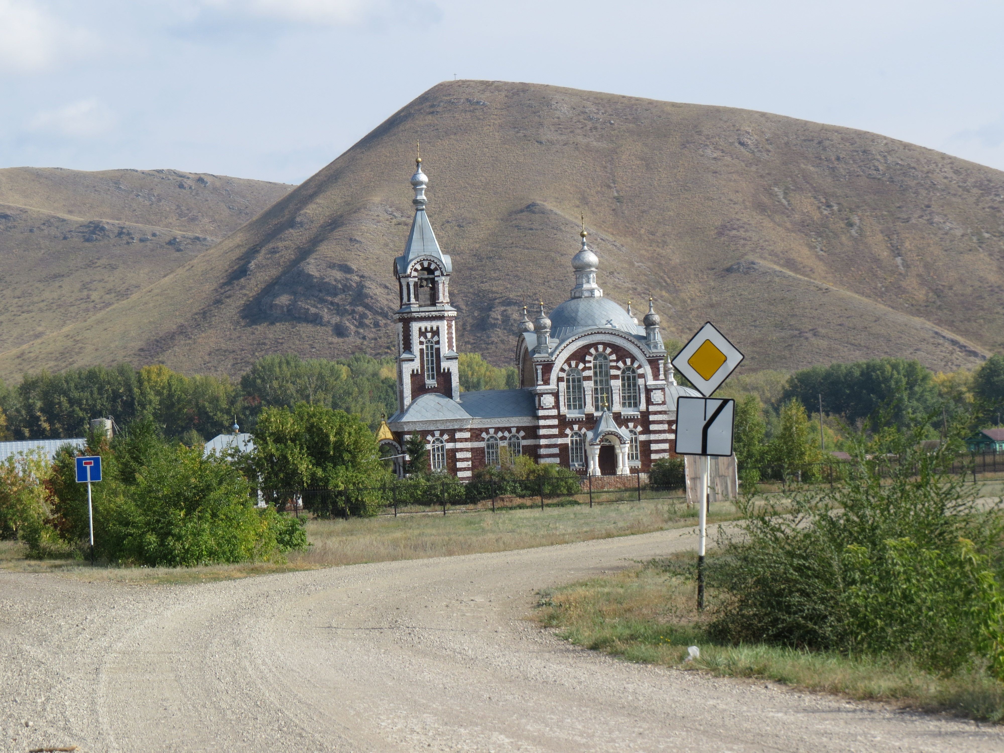 Церковь в Андреевке